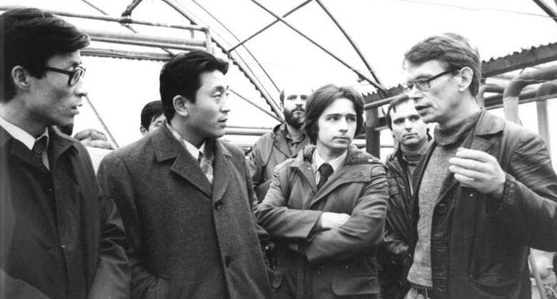 LPG Böhlitz-Ehrenberg, Besuch einer koreanischen Delegation ADN-ZB Kluge 8-2-82-Leipzig: Die gegenwärtig in der DDR weilende Delegation des Verbandes der Sozialistischen Jugend der Arbeit Koreas unter Leitung des Vorsitzenden des ZK des VSJAK, Ri Jong Su (2.v.l.), besuchte die LPG Gemüseproduktion Böhlitz-Ehrenberg. Die Betriebsleiter Dr. Ernst Haß (r.) informierte die Gäste über die Wettbewerbsvorhaben der LPG